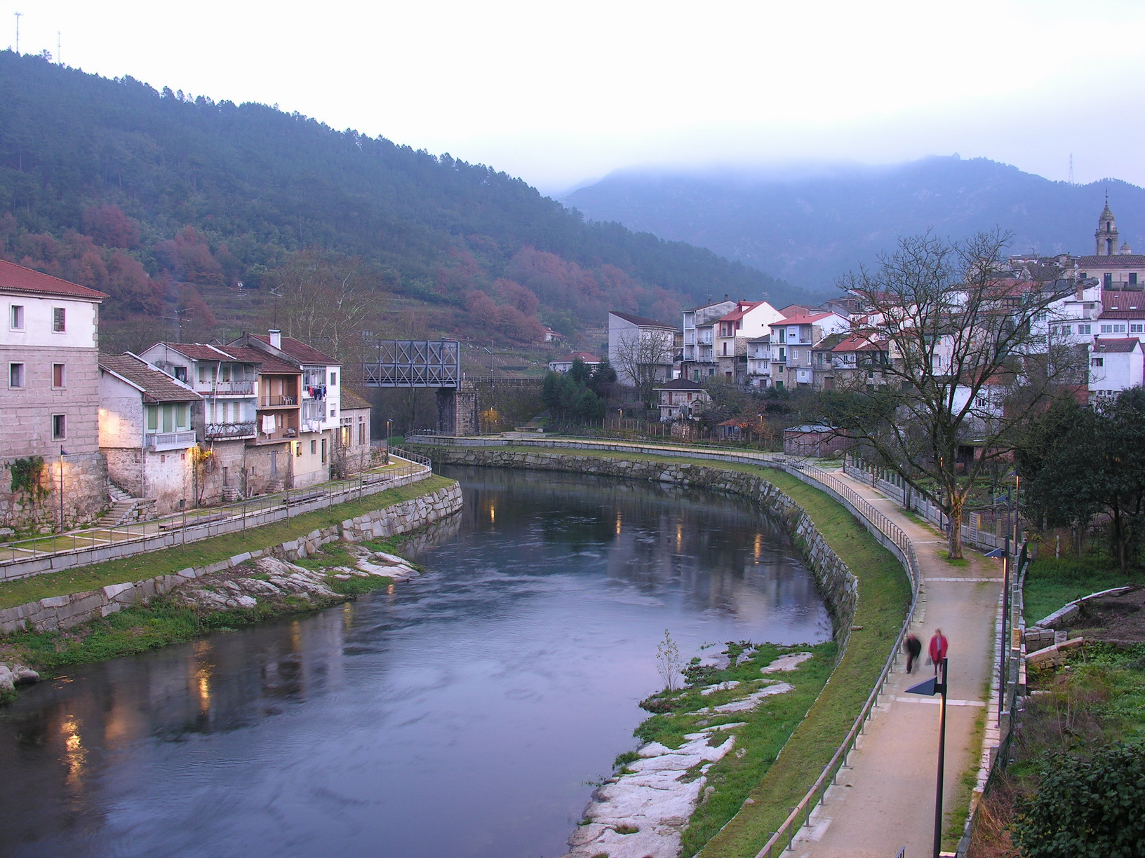 self made. Ribadavia - Galicia - Spain Río Avia anoitecendo en Ribadavia